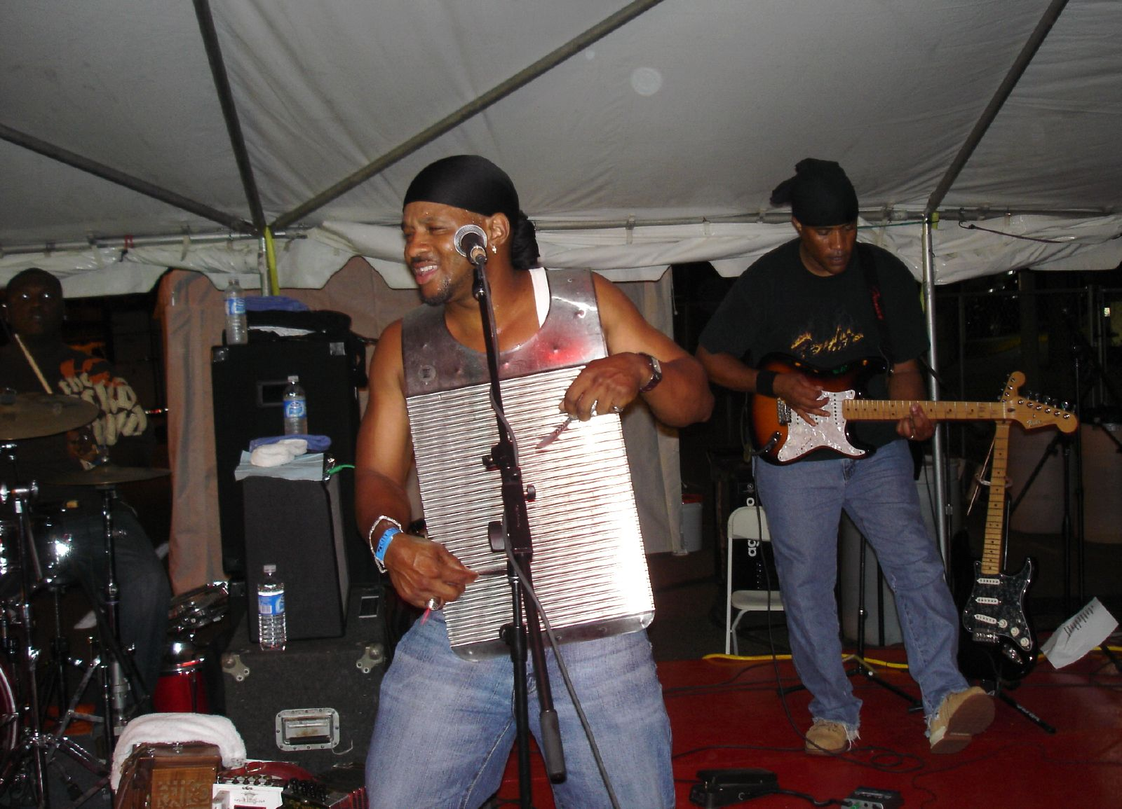 La "mitica" washboard o rubboard o frottoir usata nella musica Zydeco